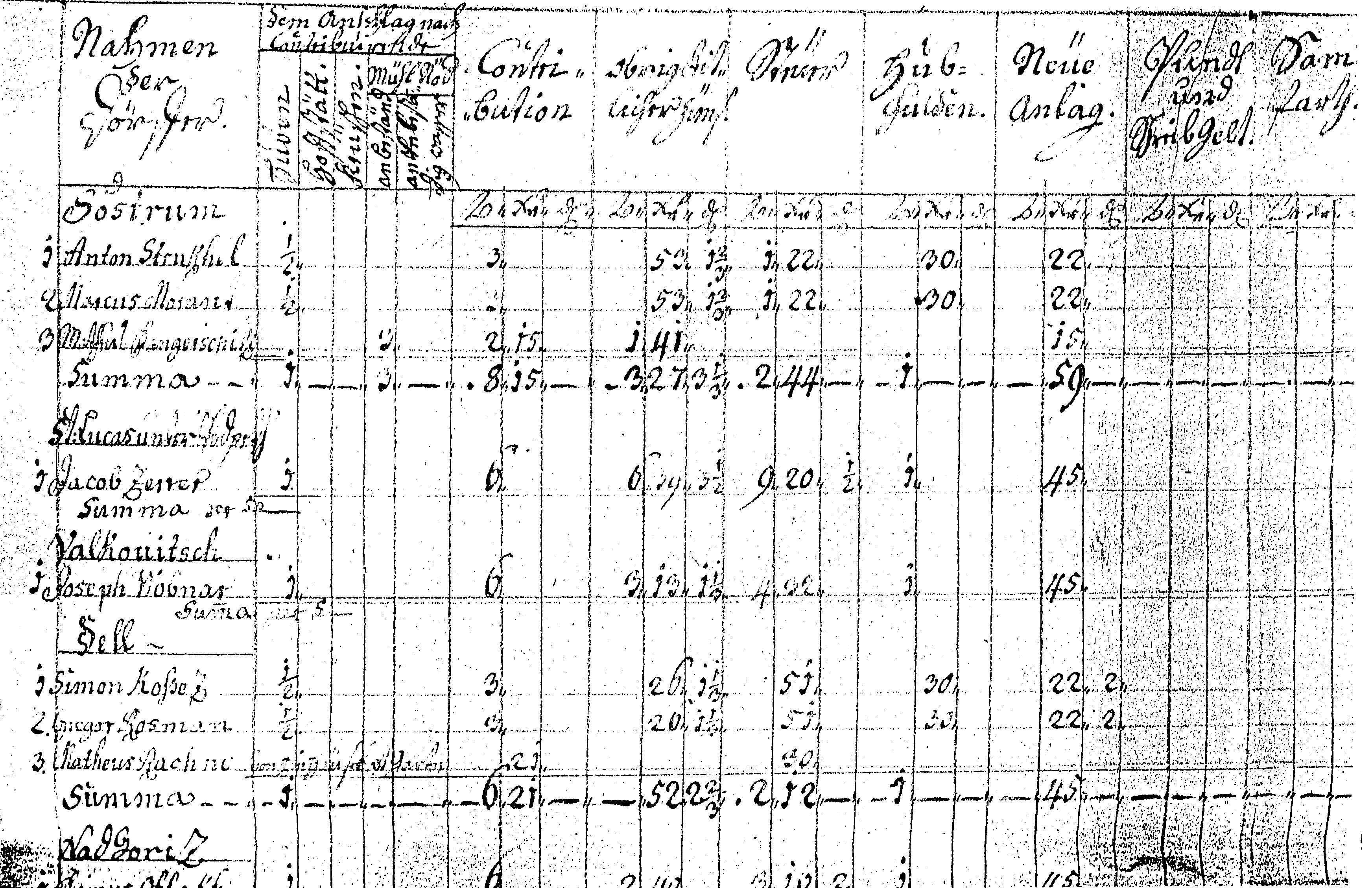 Terezijanski kataster za Kranjsko, Gospostvo Bokalce, obrazec D - urbarski ekstrakt. Pojmi: Aufschlag - doplačilo Contribution - davek (kot davek na osebo) Obrigkeitlicher züns - davek zemljiškemu gospostvu Steuer - davek hub-gülden - hubni goldinar Neue Anlag - nova naklada)